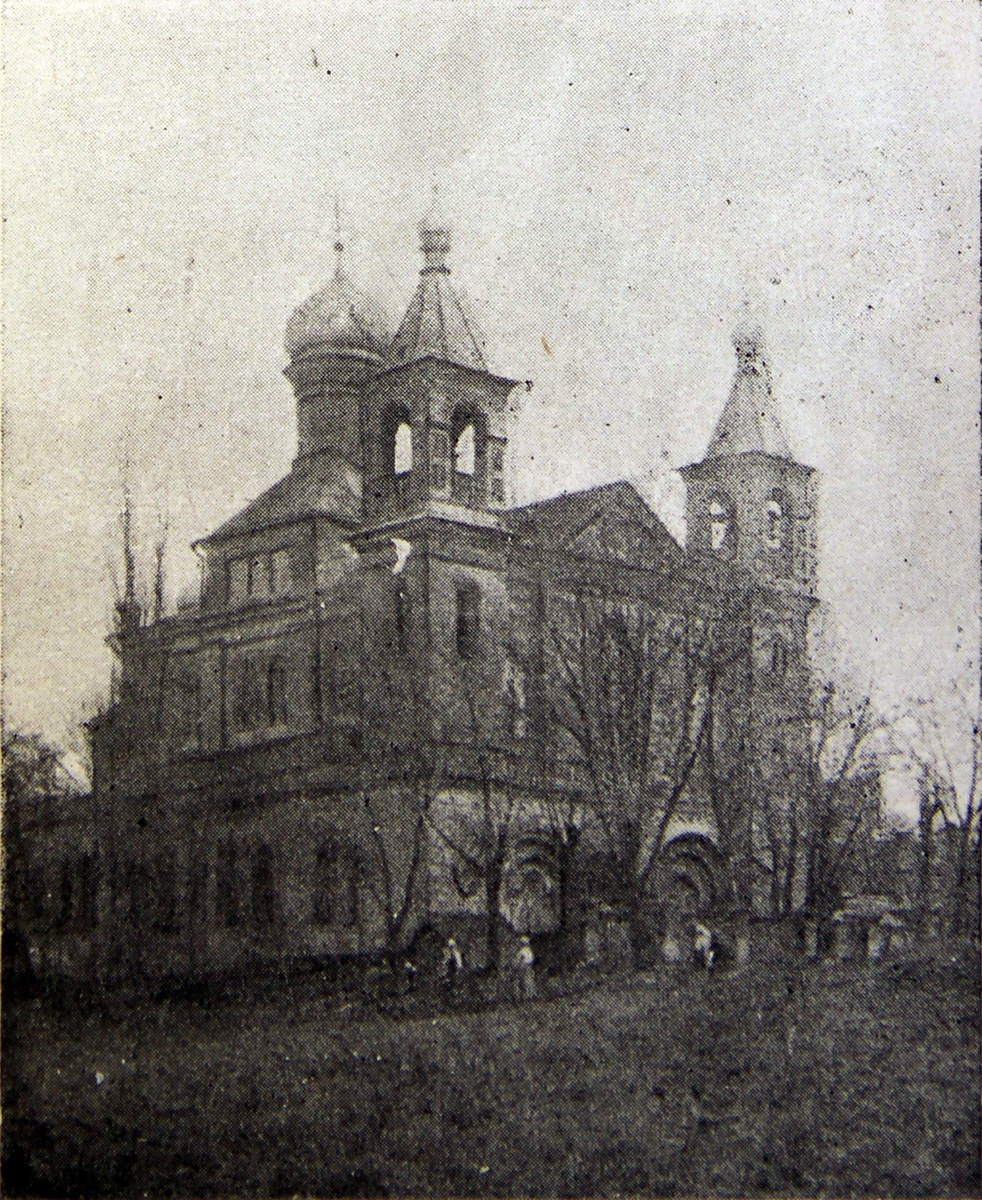 Беларуская (тарашкевіца): Менск (Miensk), рог вуліц Нямігі (vulica Niamiha) і Ракаўскай (vulica Rakaŭskaja). Царква Сьвятых Апосталаў Пятра і Паўла